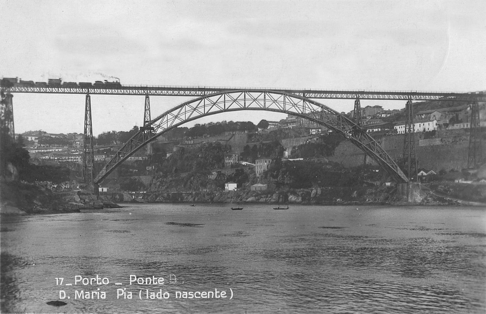 Postal ilustrado mostrando a ponte D. Maria Pia (Porto, Portugal), vista de nascente, com um comboio puxado por uma locomotiva a vapor acabado de entrar no tabuleiro a caminho de Campanhã.